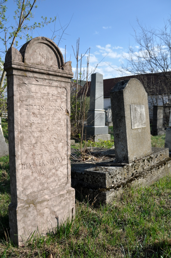 Old jewish cemetery, Rákoskeresztúr